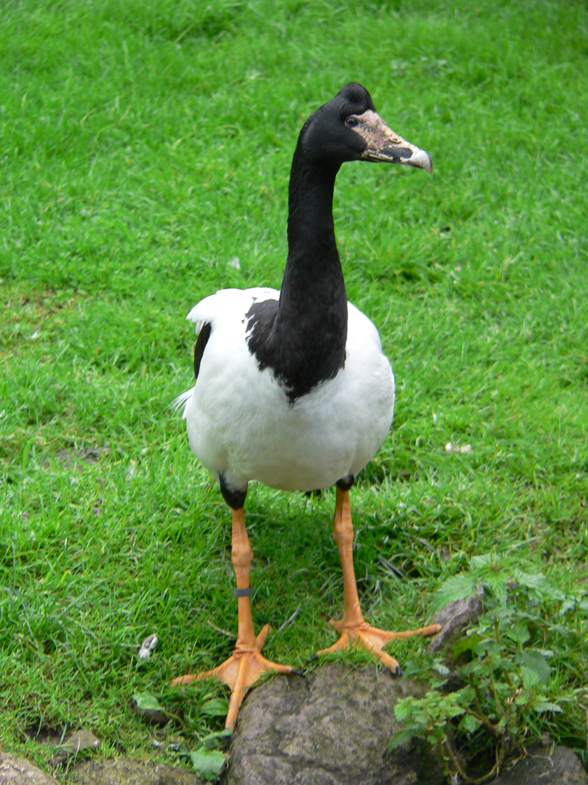 Spaltfußgans